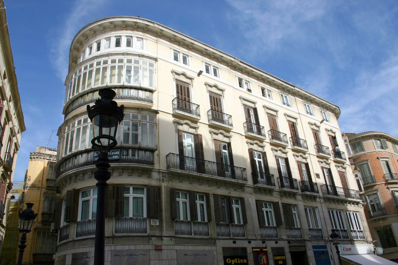 Eficidio en Larios 1. Eduardo Strachan Viana-Cárdenas. Built 1888-1890